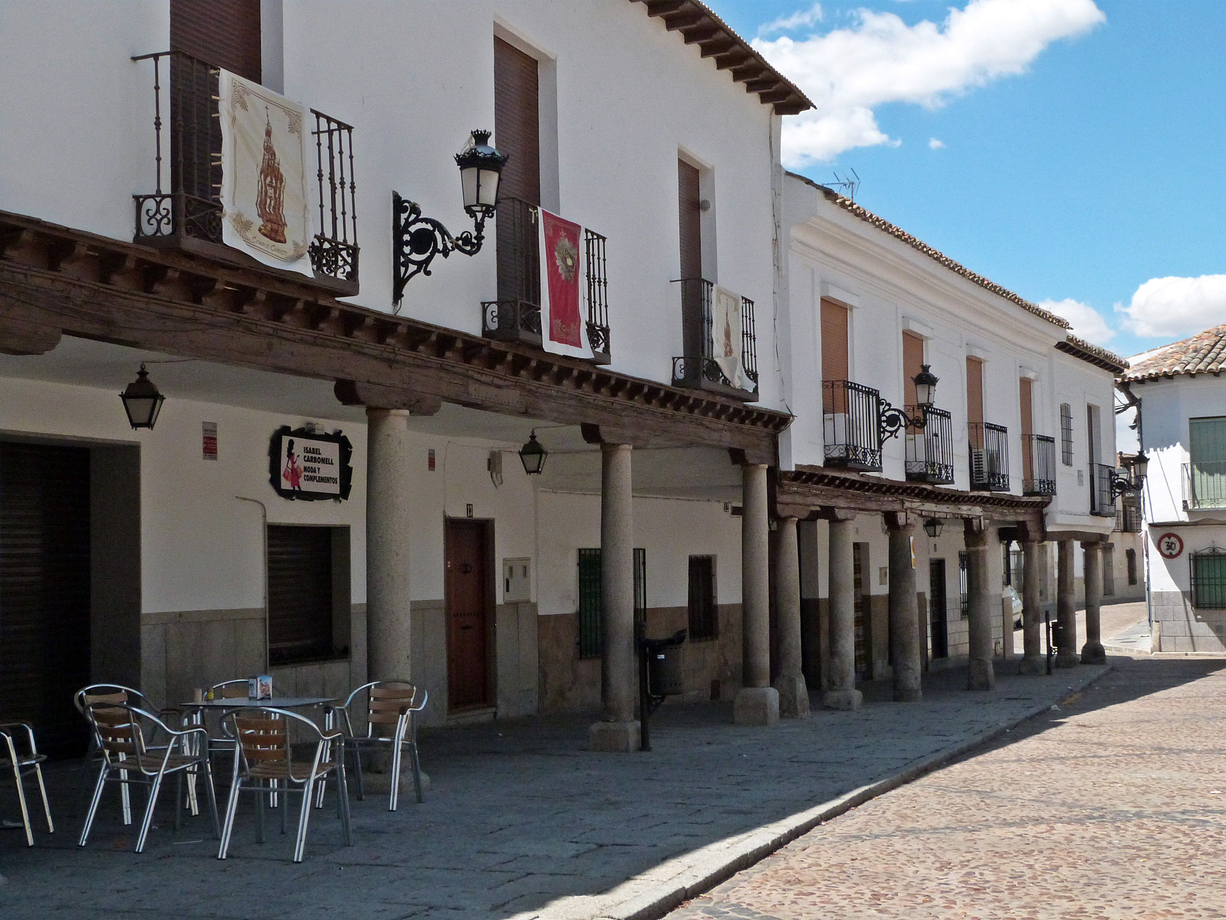 Straße in Orgaz